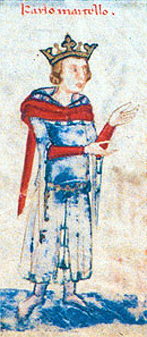 Charles Martel of Anjou